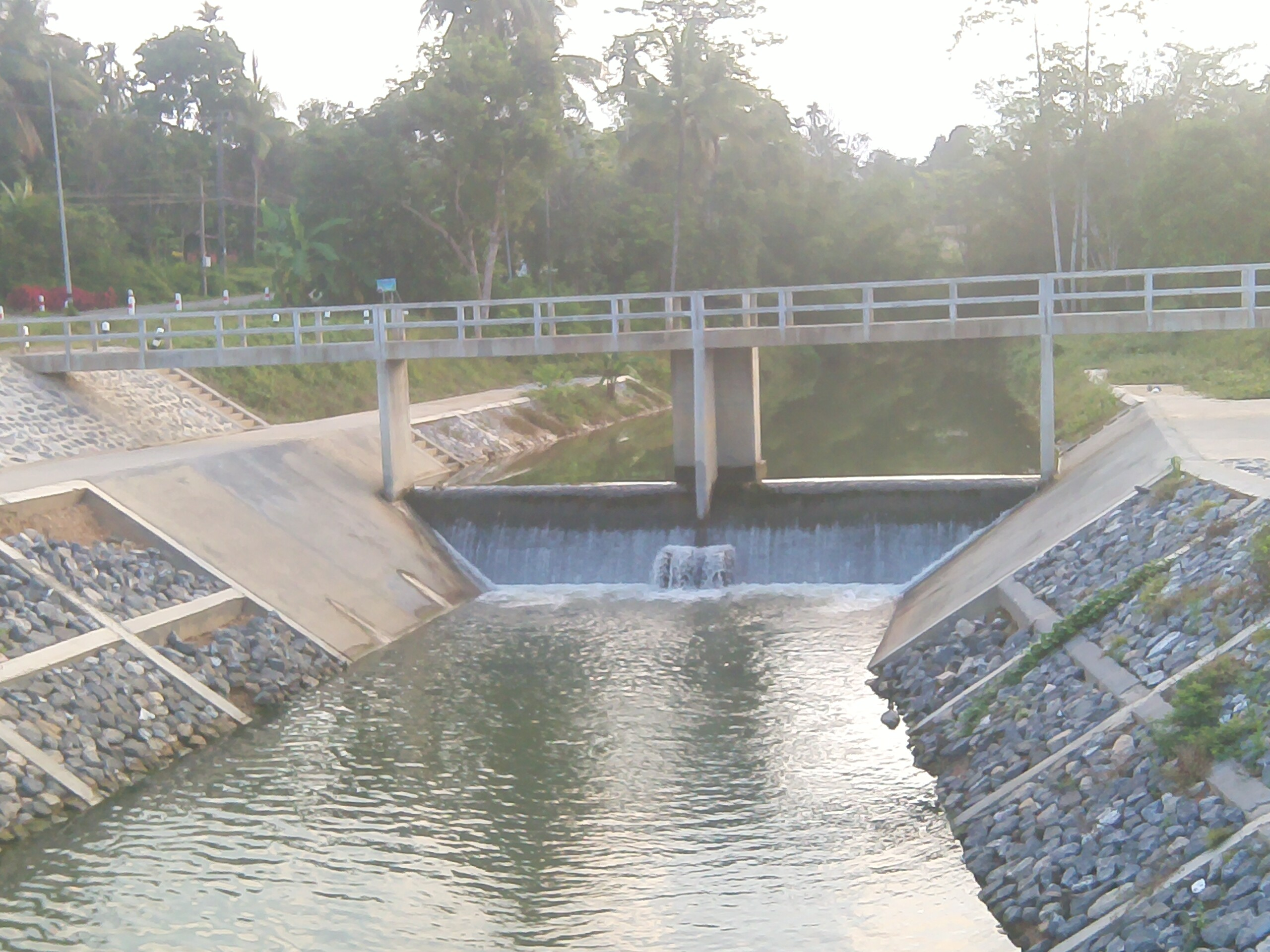 เป็นคลองสายหลักของอำเภอมะนัง